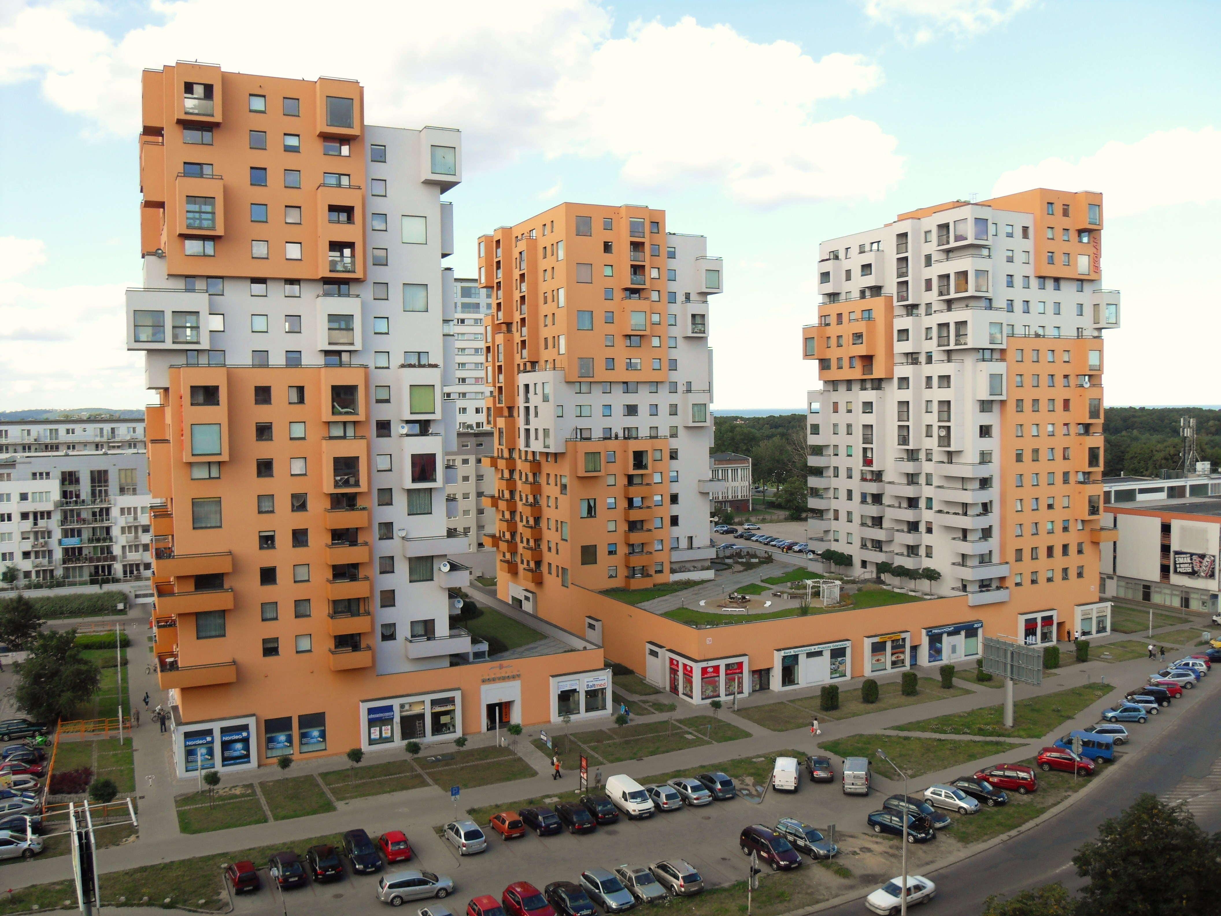 Gdańsk Przymorze. Wieżowce Horyzont, ul. Obrońców Wybrzeża.